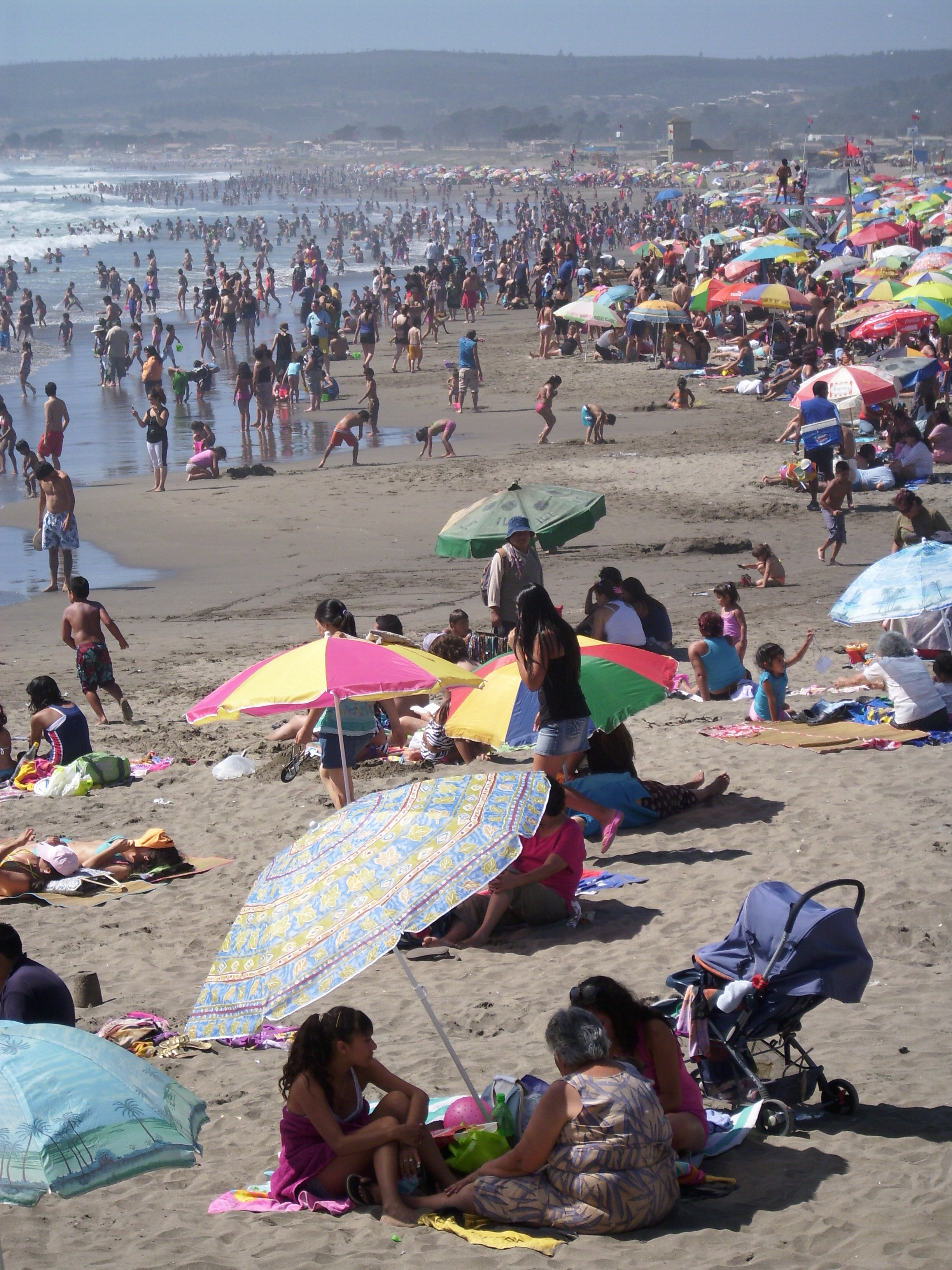 La multitud que visita la Playa Grande de Cartagena cada verano. Provincia de San Antonio, V Región de Valparaíso, Chile.